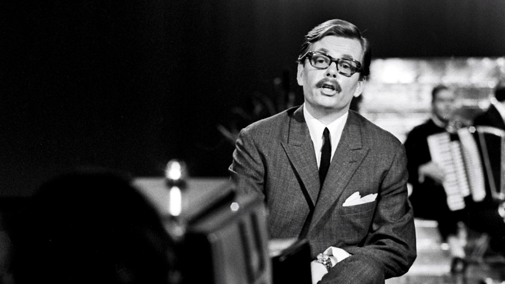 Martti Innanen televisiostudiossa 22. syyskuuta 1968.